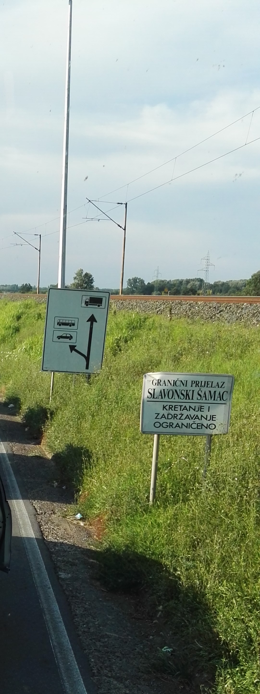 Slavonski Šamaci táblák